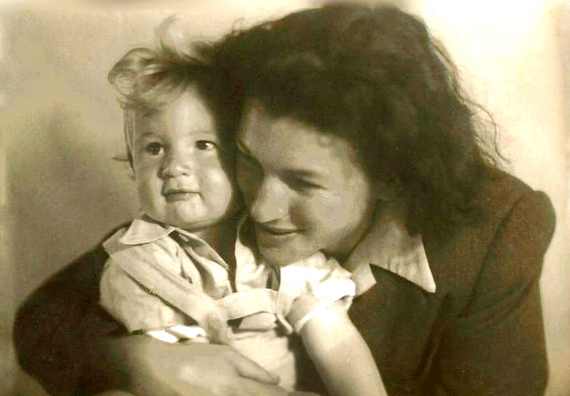 רחל מרקובסקי עם בנה יקי